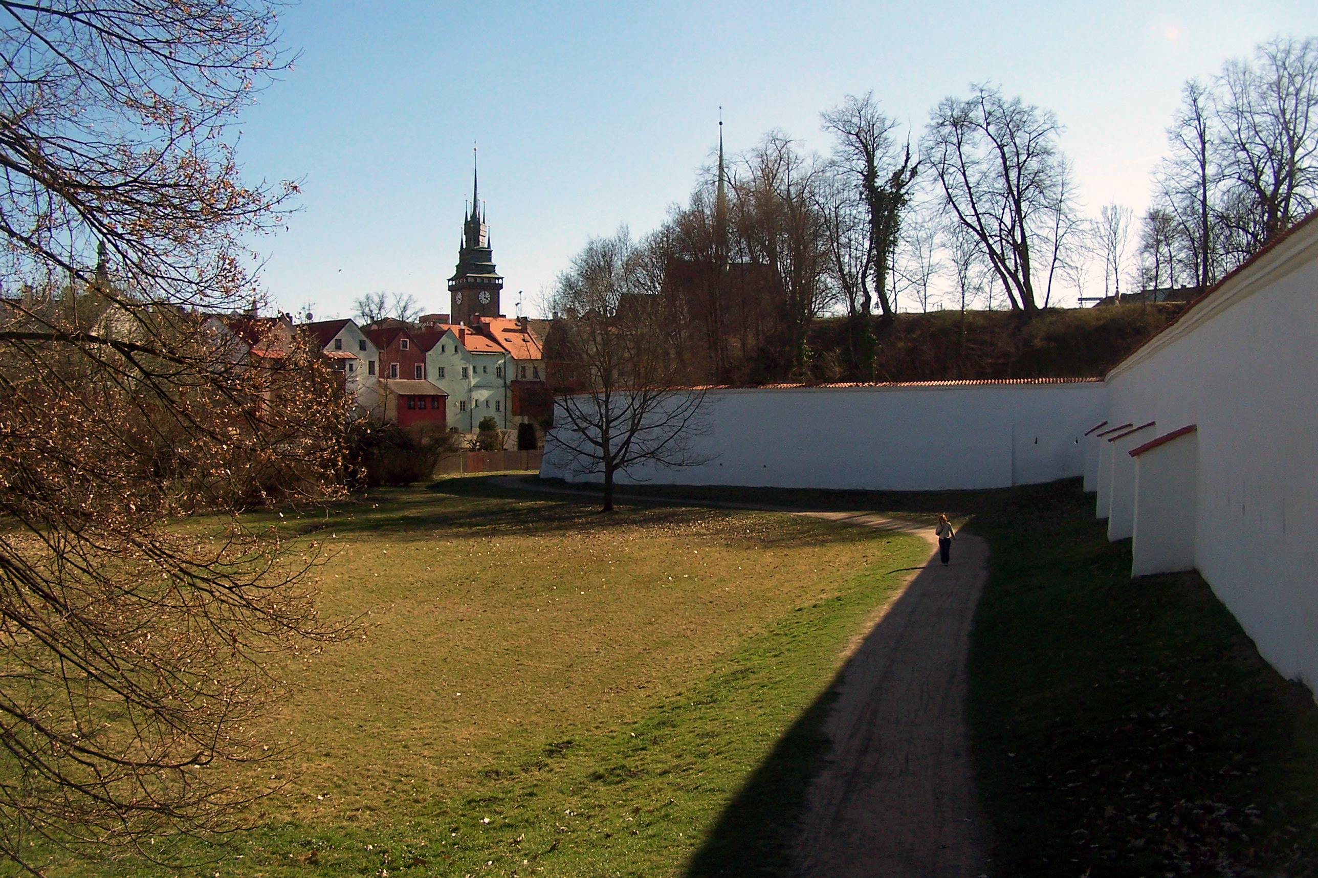 Tyršovy sady od vchodu do zámku. V pozadí Zelená brána. GPS: 50°2'27.453"N, 15°46'40.031"E